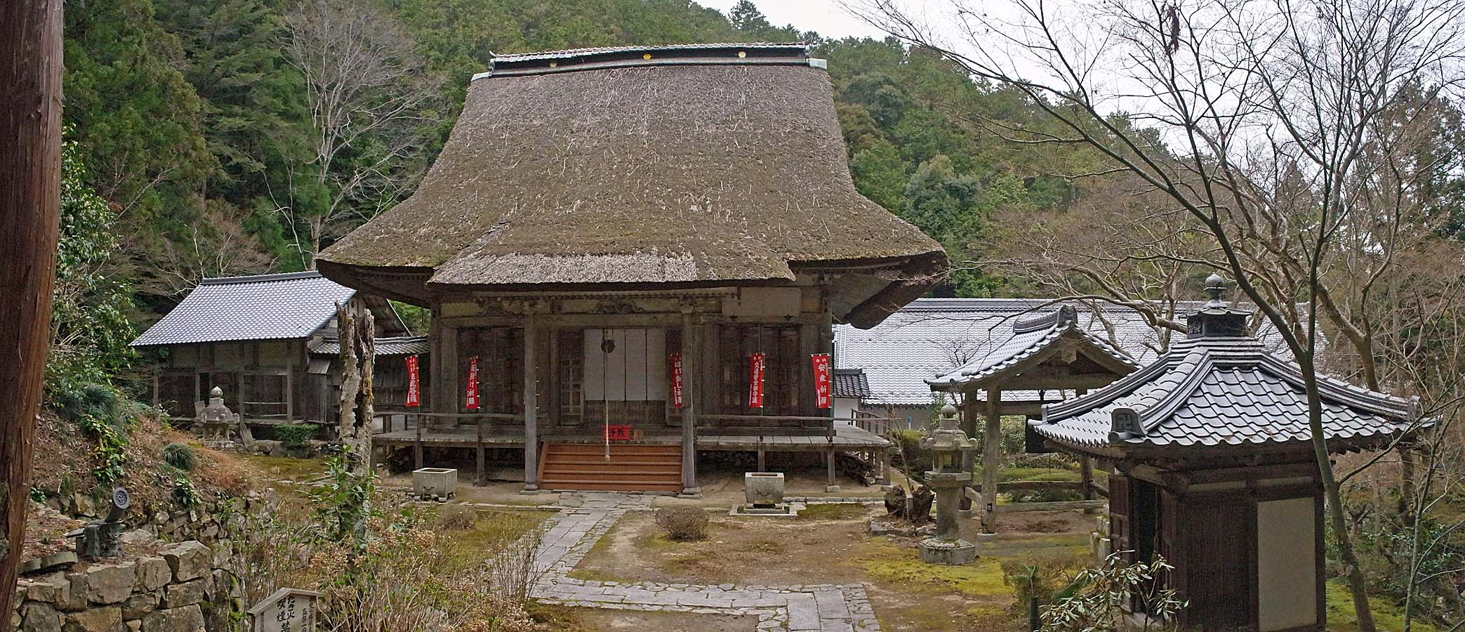 Kawaraya Temple , 瓦屋禅寺